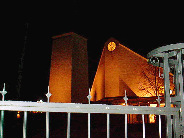 Bild på Jesu Kristi Kyrka av Sista Dagars Heliga i Västerhaninge. Bilden är tagen under vintertid sent på kvällen och därför resulterar den i en mycket mörk skärpa.